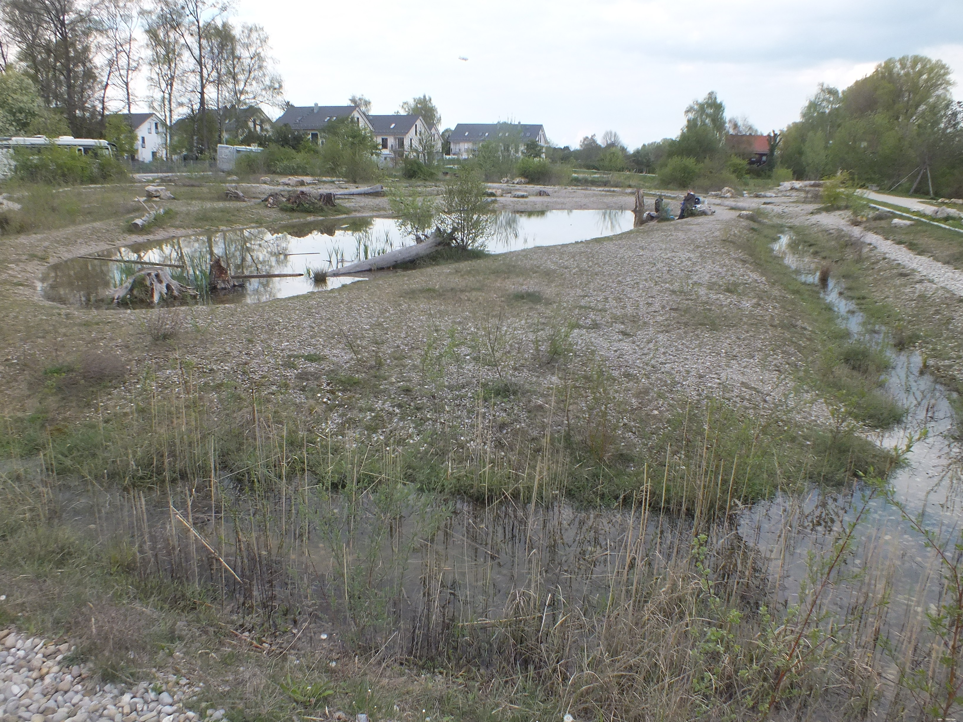 Amphibienbiotop Fasanerie